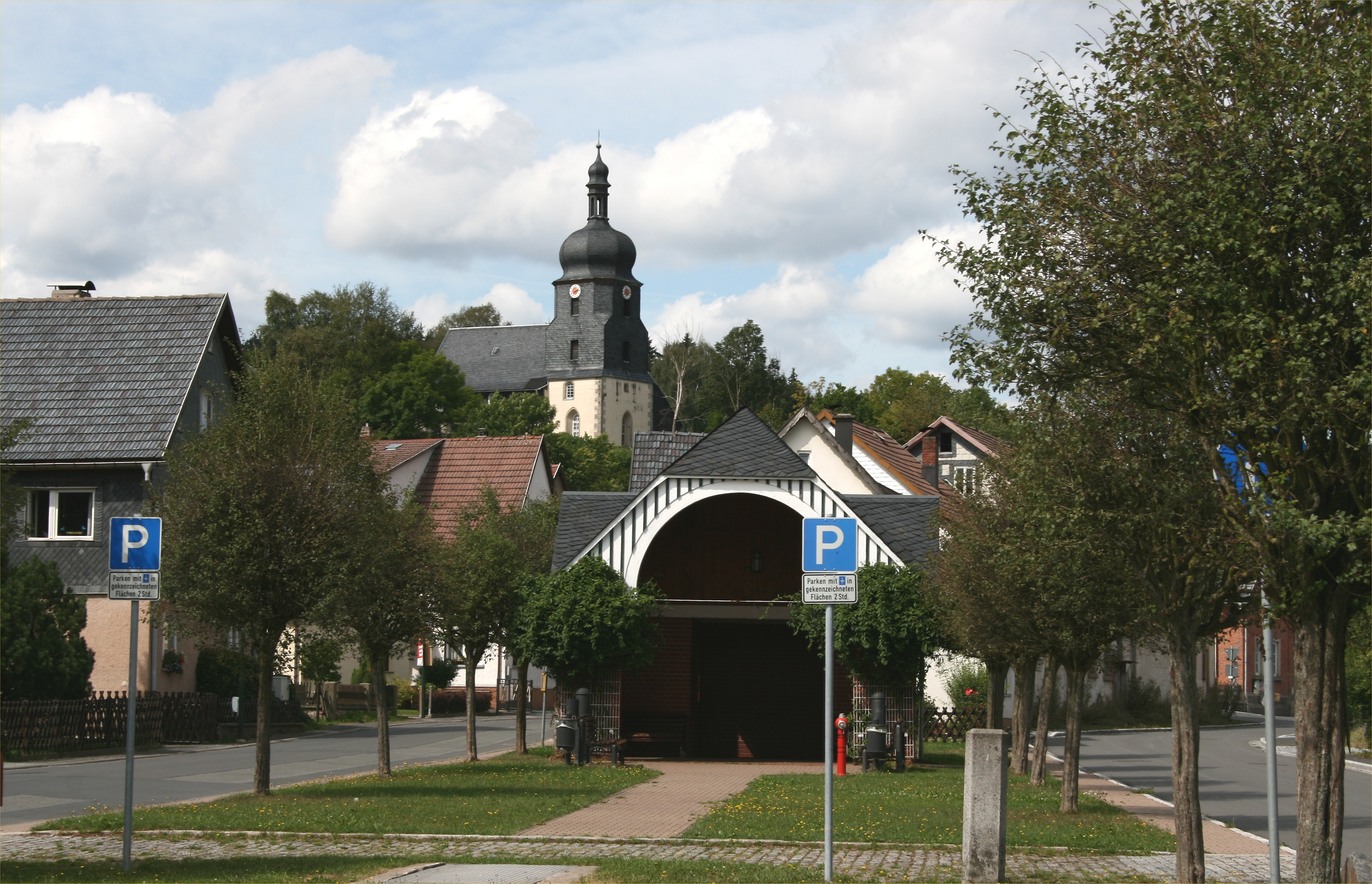 Ortsmitte von Heinersdorf (Judenbach) in Thüringen mit der Marienkirche.